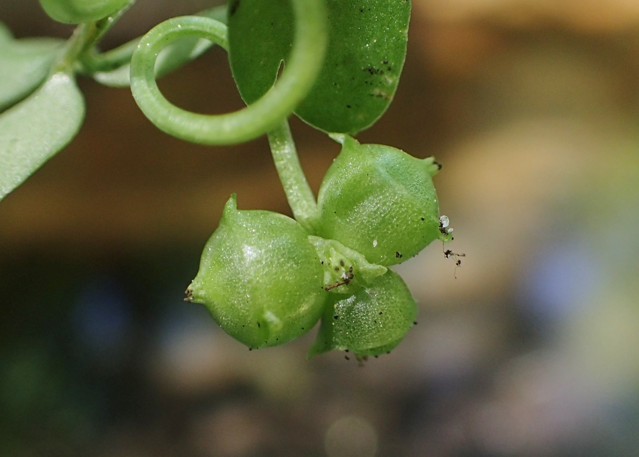 Adoxa moschatellina fruit. Dąbie near Płoty, NW Poland